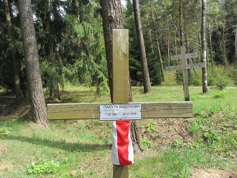 Мінск. Курапаты